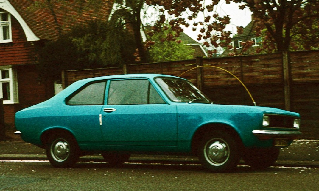 Hillman Avenger 2 door in Epping